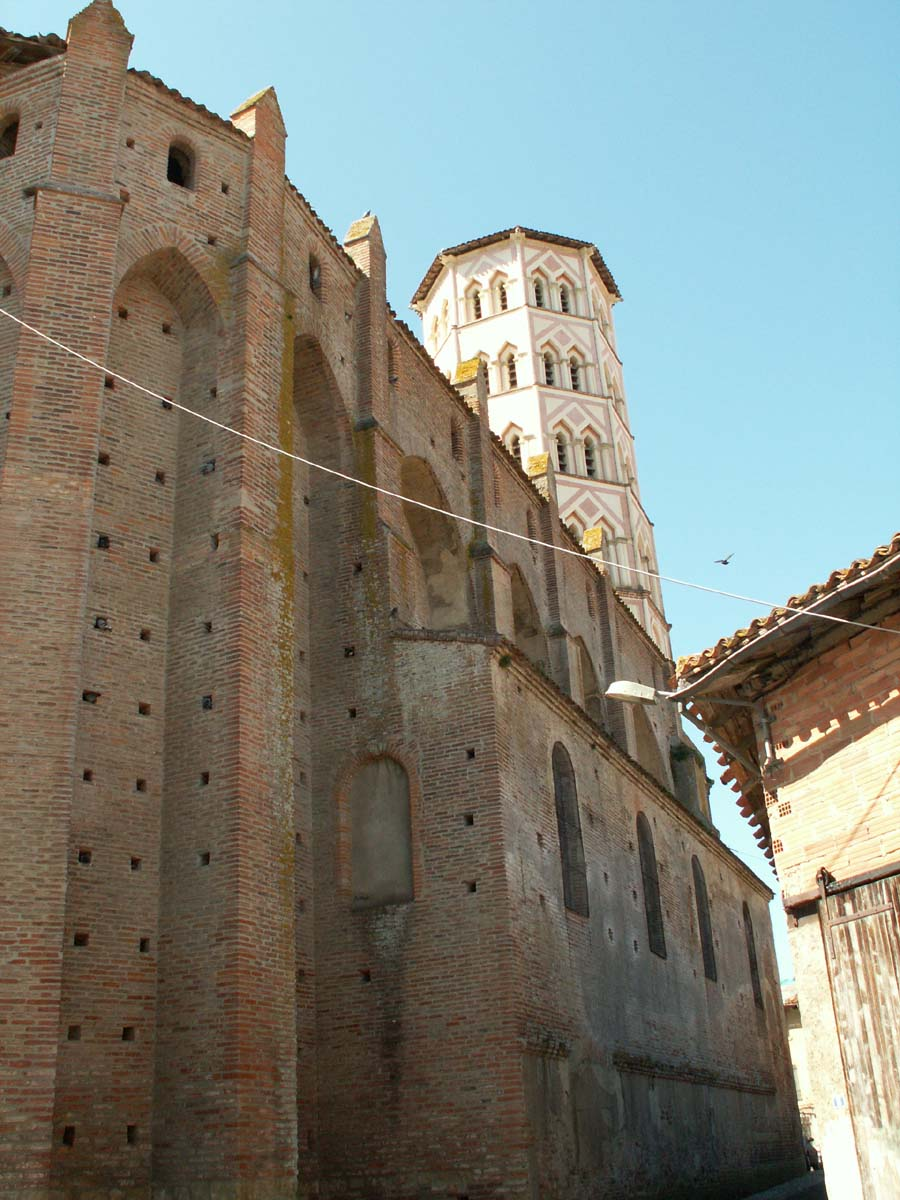 Cathédrale Sainte Marie in Lombez, Gers, France